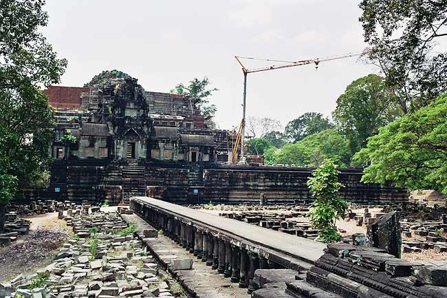 Baphuon - temple in Angkor, Cambodia